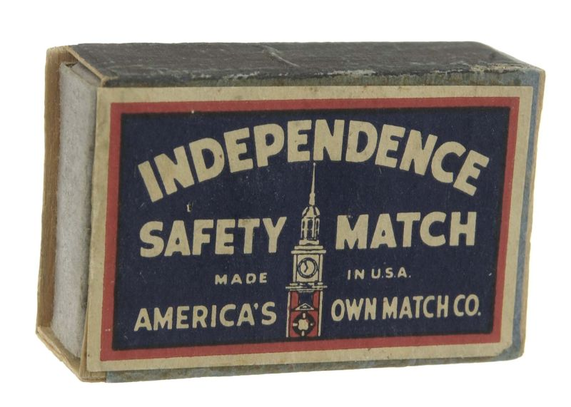 Luciferdoos. Vermoedelijk van Java afkomstig luciferdoosje met propaganda van de geallieerden. Dit doosje heeft het opschrift "Independence, Safety Match - made in U.S.A.- America's own match co.". Als reactie op de goed geoliede propaganda-machine van de Japanners, kwamen de geallieerden met tegenpropaganda om sabotage af te wenden.. Luciferdoos met propaganda-opschrift van de Japanners